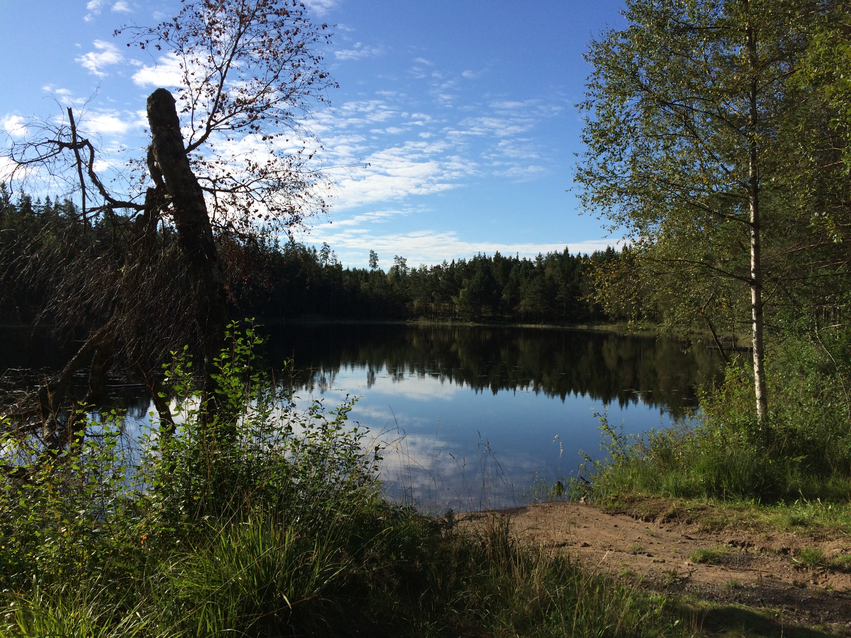 Igelsjön, Hunneberg